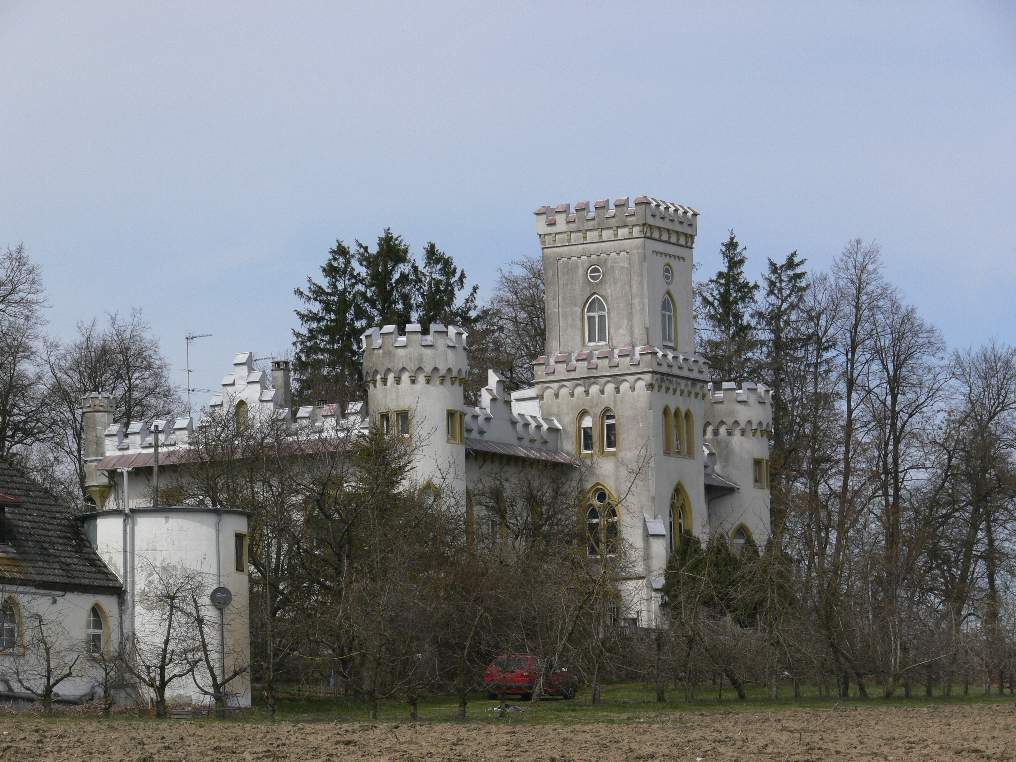 Schloss Benzenhofen, 88276 Berg, Landkreis Ravensburg